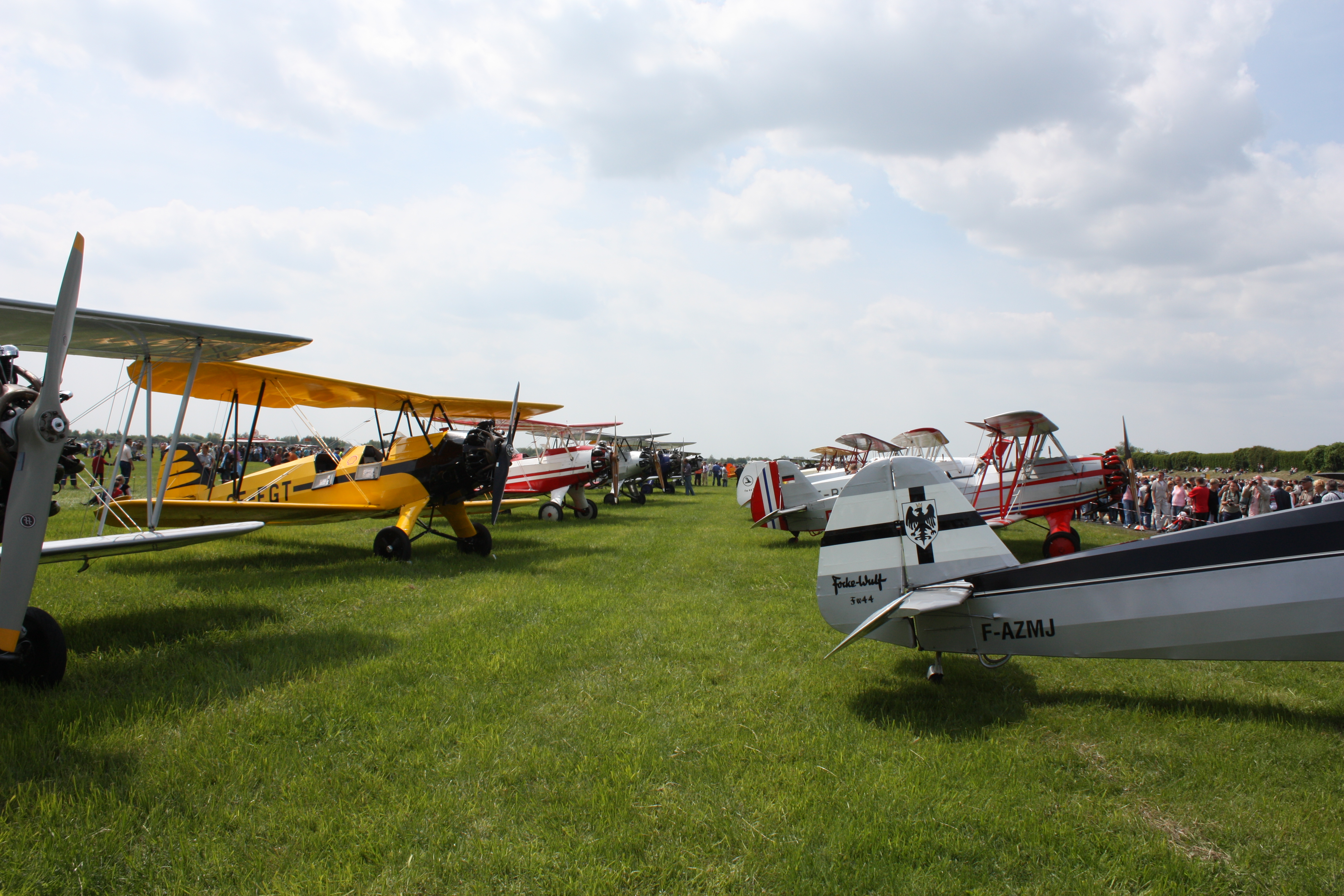 Bremen Airport Flugtag 2009